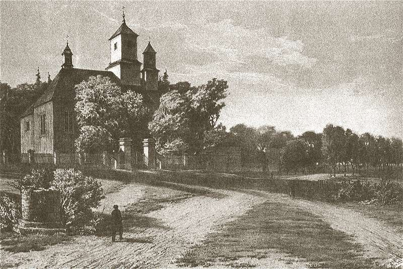 Świsłocz na Grodzieńszczyźnie. Podpis oryginalny:"SWISŁOCZ (G. Grodzieńska) Kościół fundowany r. 1666. W miasteczku Hrabia Wincenty Tyszkiewicz założył swoim kosztem r. 1806 sławne Gimnazium dla uczącej się młodzieży." Беларуская (тарашкевіца): Сьвіслач (Гарадзенскі раён)